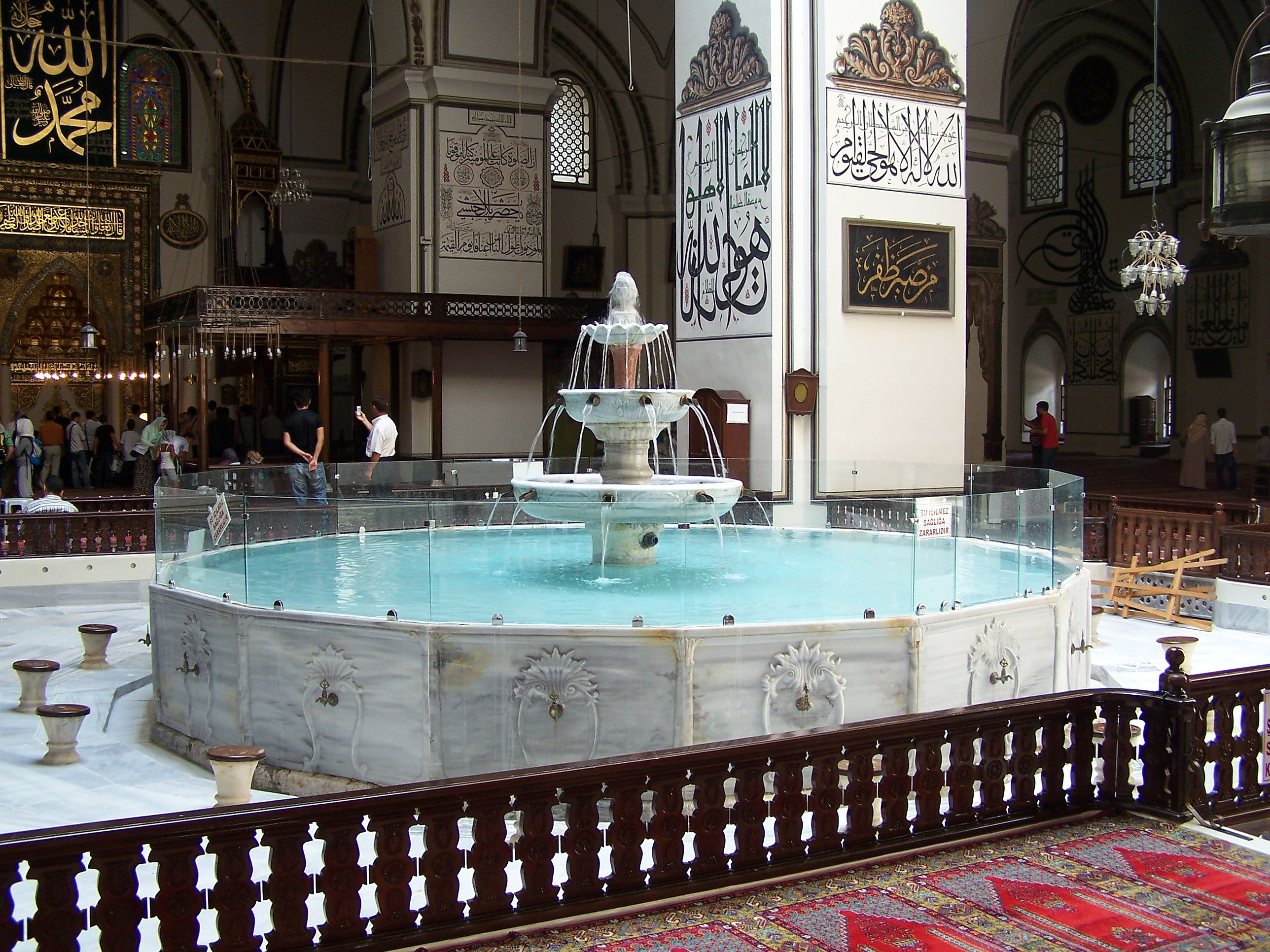 Inner şadırvan of Ulu Camii in Bursa, Turkey